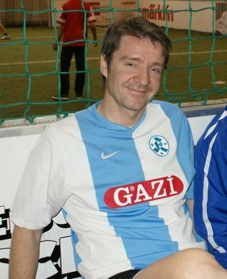 Torsten Raspe 2011 bei einem Hallenturnier